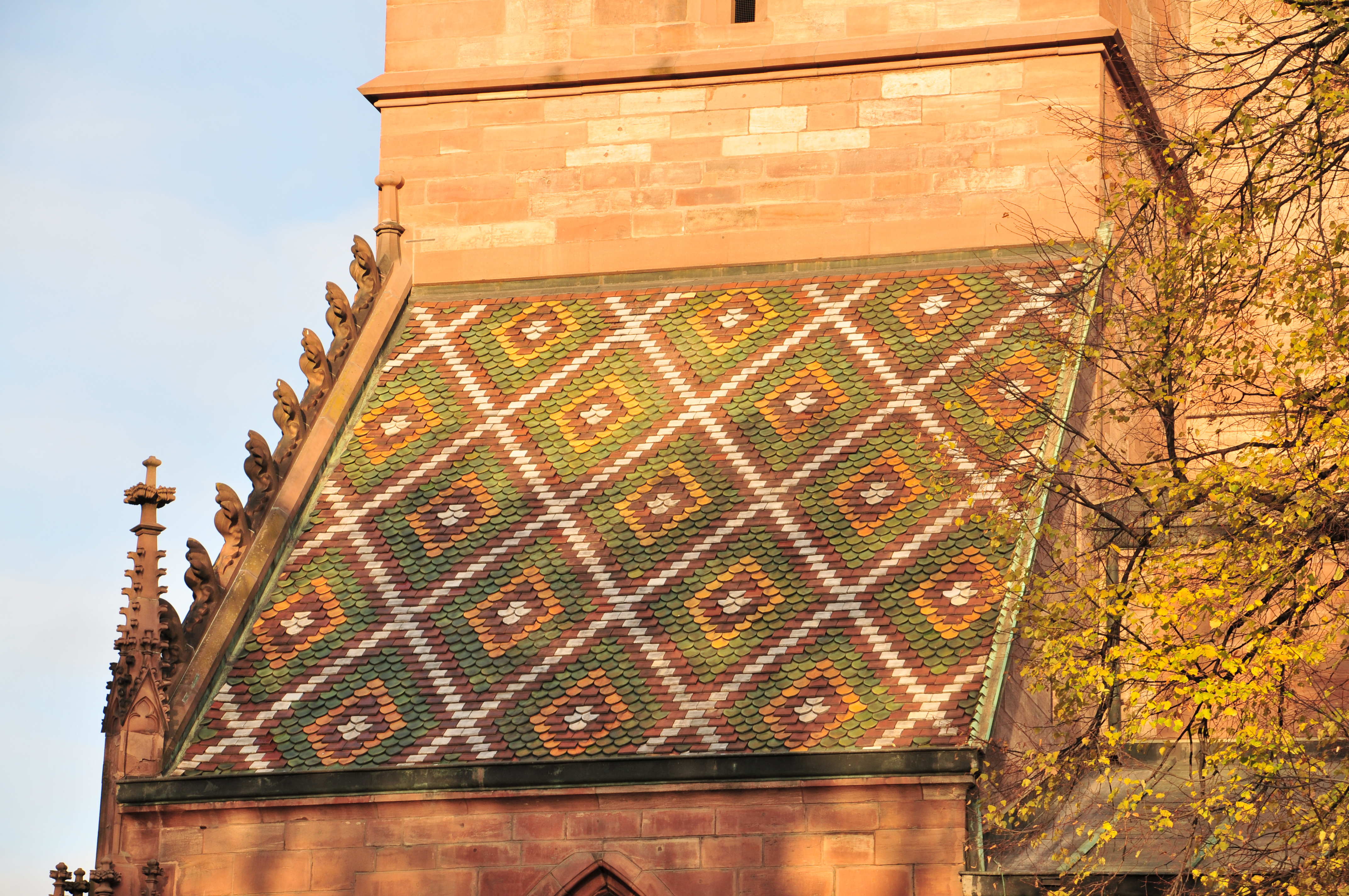 Basel